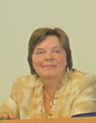 Горячева И.Г.